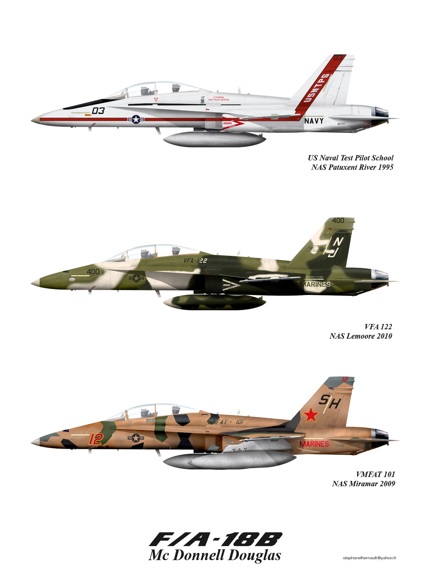 F/A 18B Mc donnell douglas version B